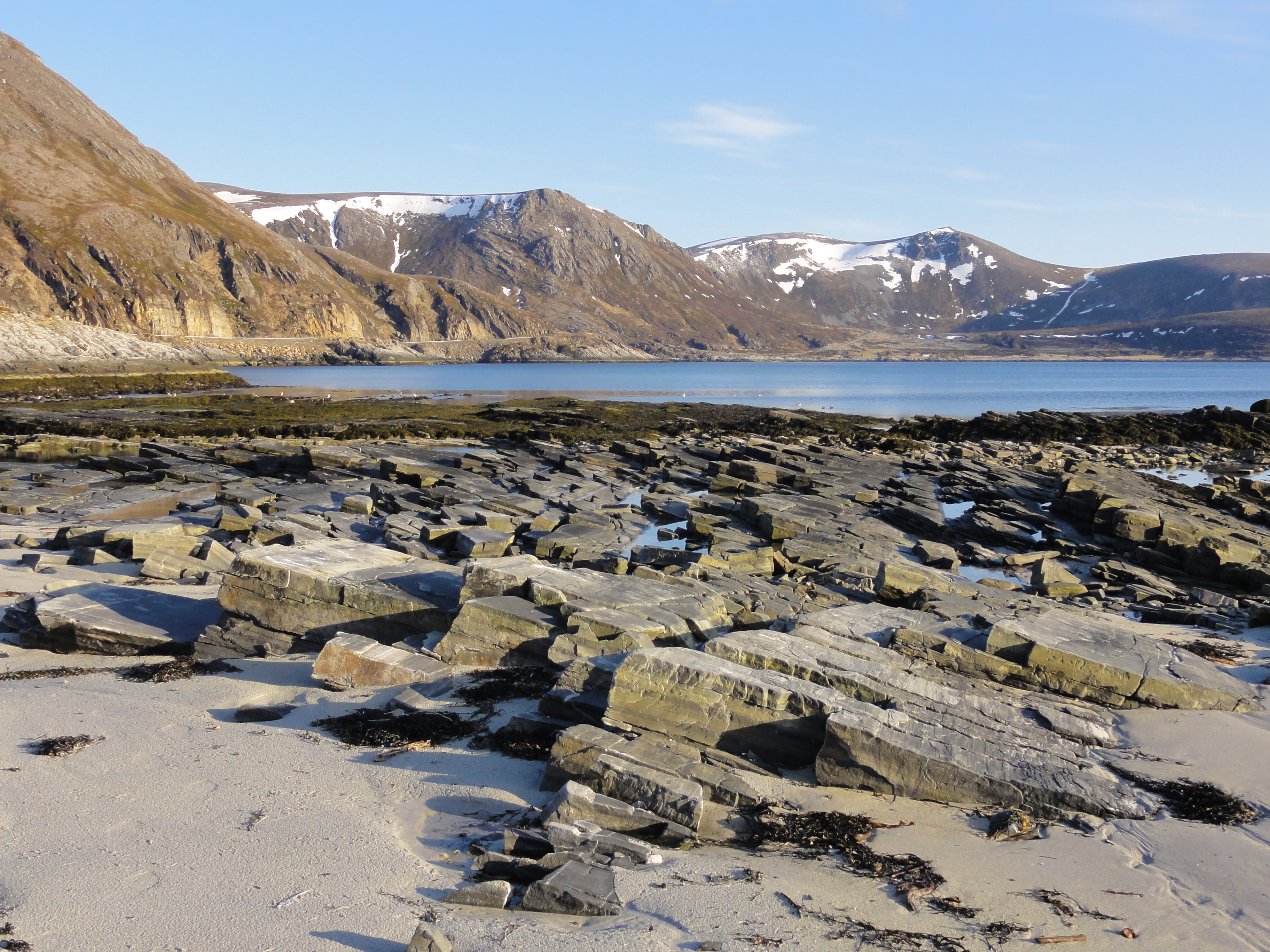 Pobrežie, Sørvær, Sørøya, Nórsko, 2015